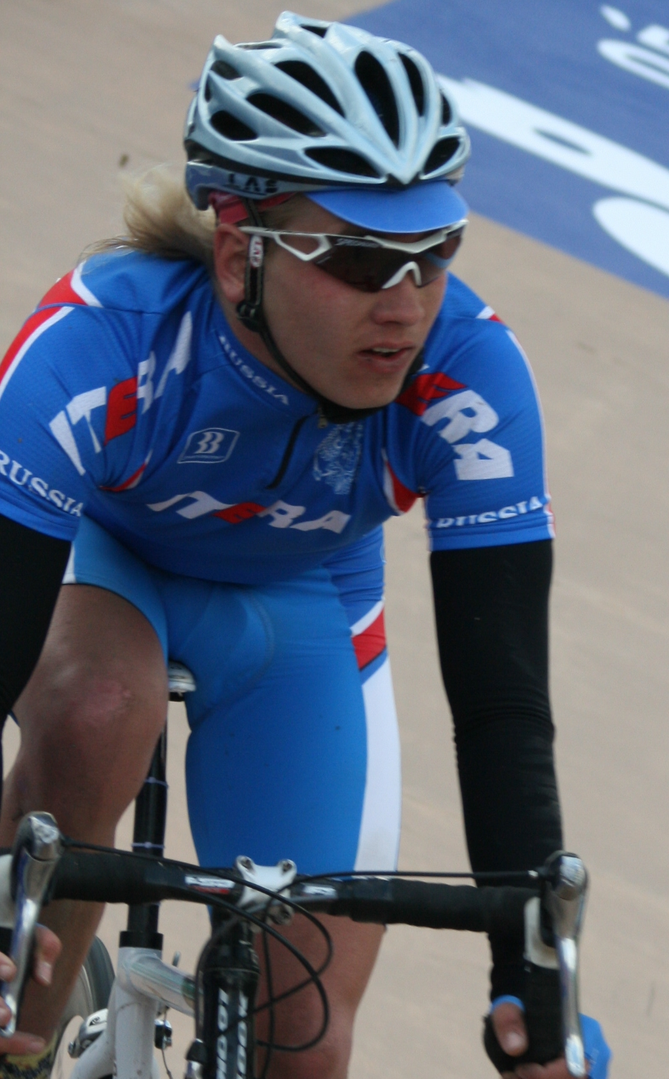 Kiril Yatsevich, à l'arrivée du Paris-Roubaix juniors 2010